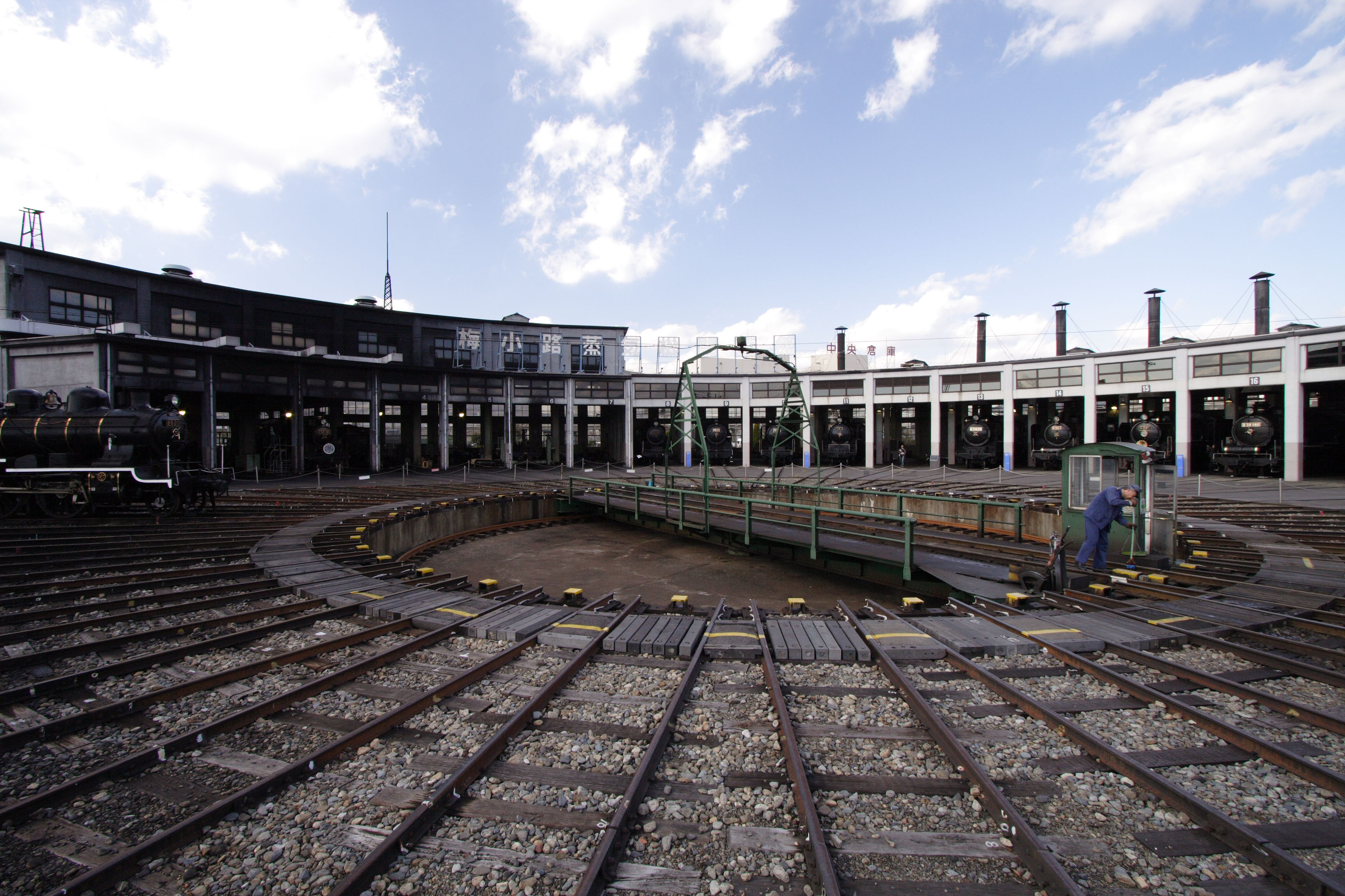 梅小路蒸気機関車館/Umekōji SL Museum in Kyoto